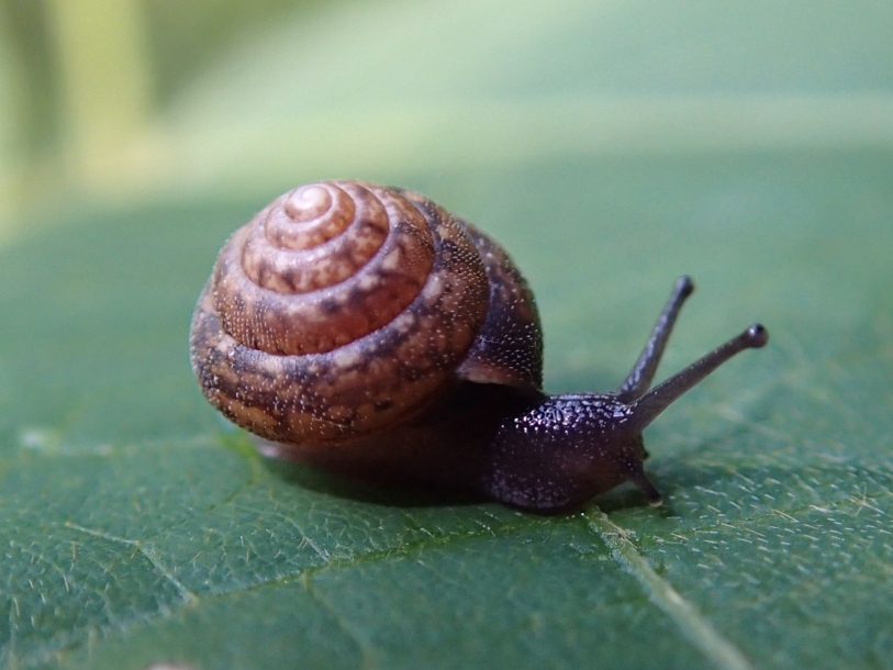 Lepidopisum conospira (Pfeiffer, 1851) (syn. Lepidopisum verrucosum (Reinhardt, 1877), about 6mm in diameter. Loc. Sagamihara, Honshu, Japan.